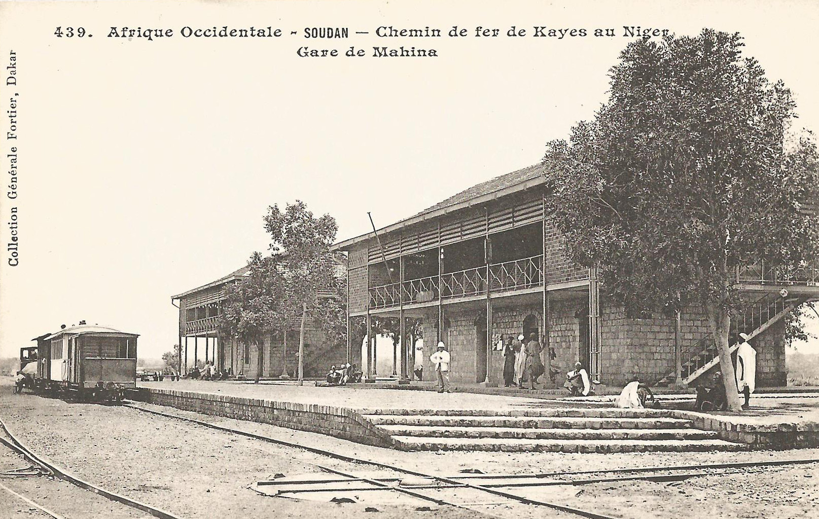 François-Edmond Fortier, Gare de Mahina. Afrique Occidentale - Soudan - Chemin de fer de Kayes au Niger.